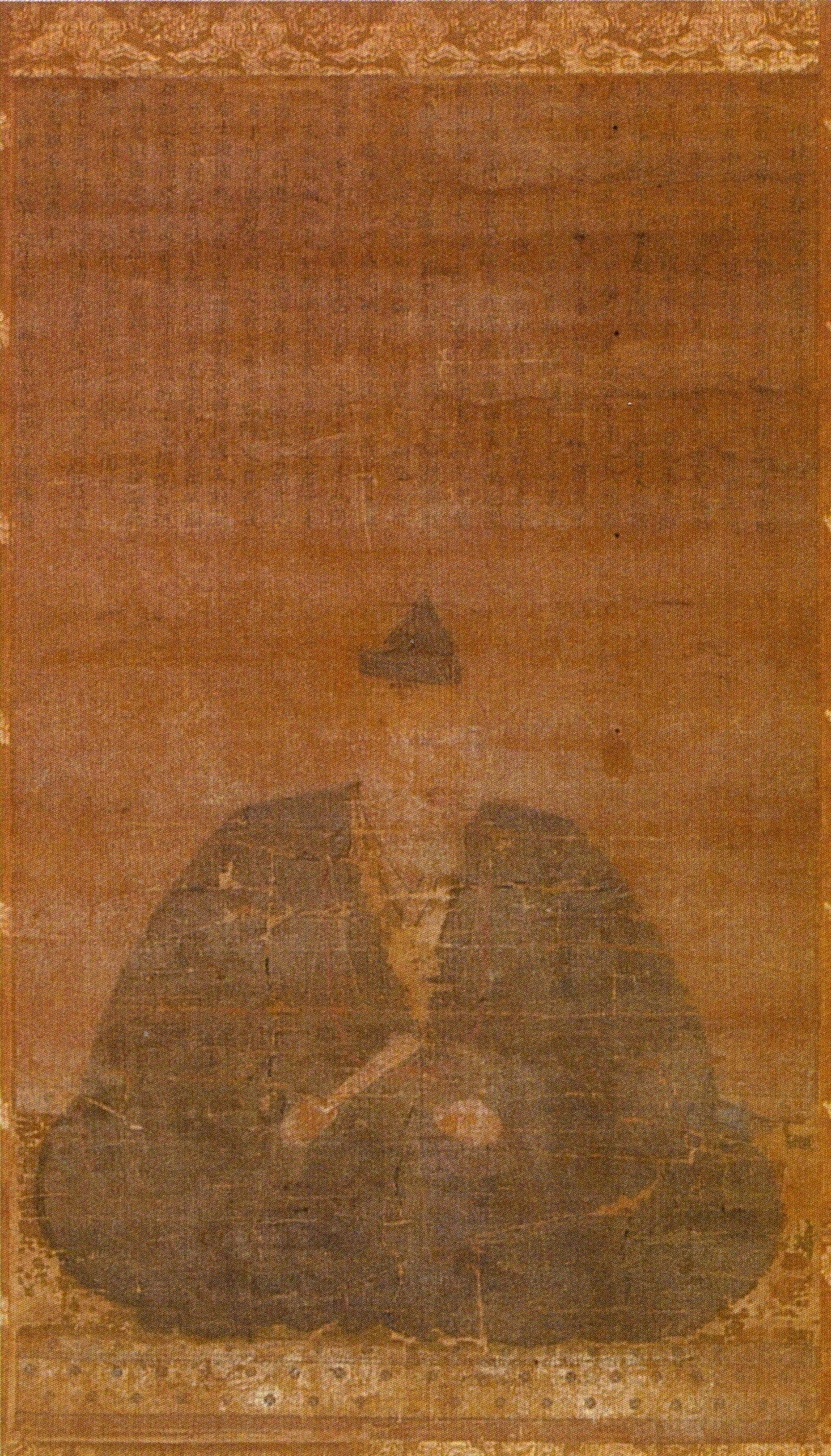 宗晴康の肖像。